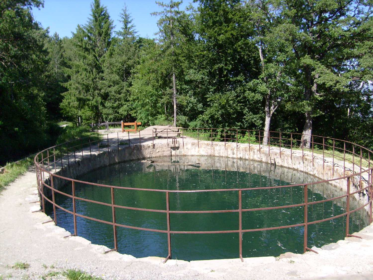 Canal de Gap( Hautes-Alpes). L'écluse-oeuf dans le domaine de Charance.